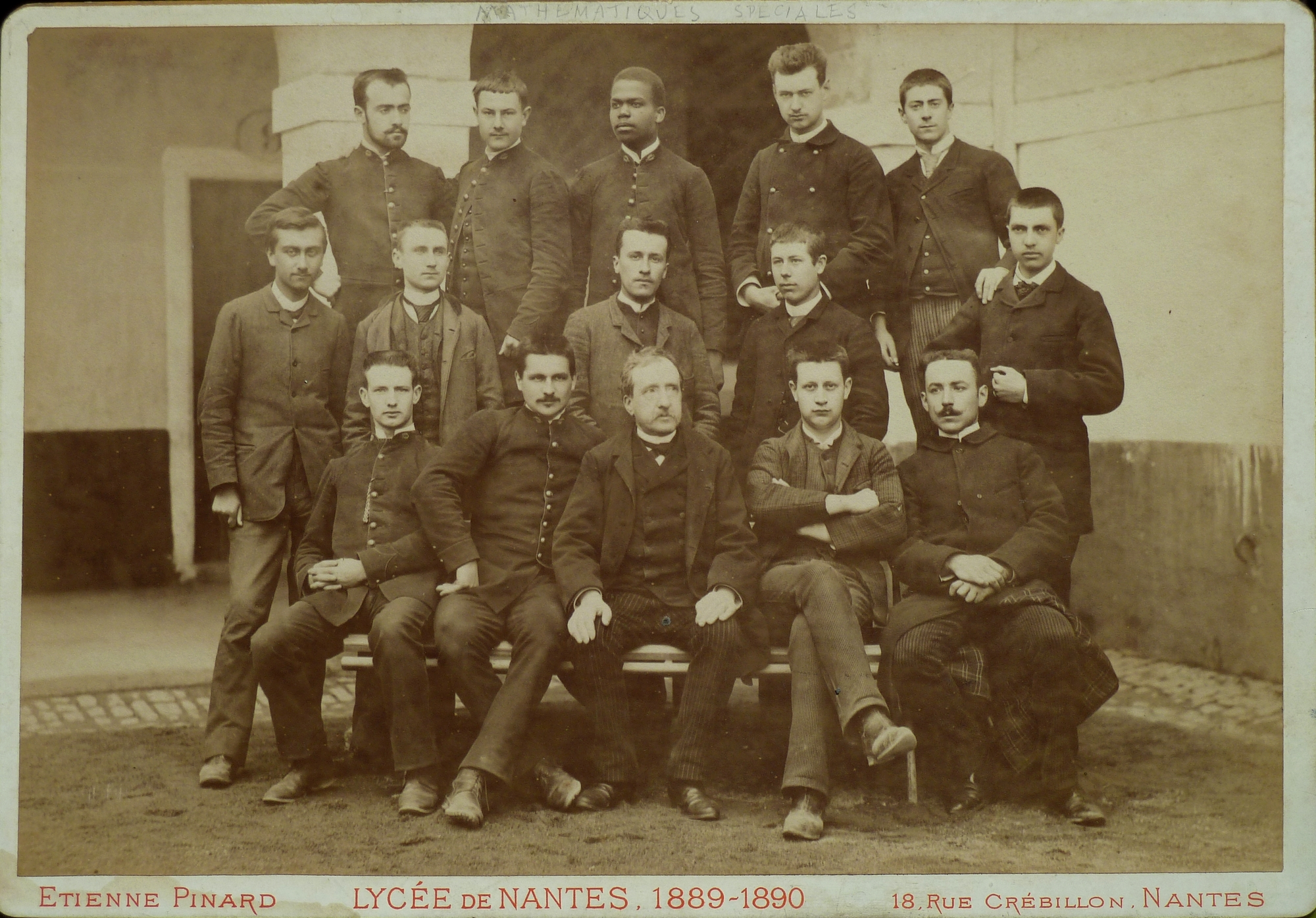 Photo de classe, mathématiques spéciales, lycée de Nantes (Loire-Atlantique), 1889 . Photographe Étienne Pinard. Dimension cliché : 23,5 x 15,5 cm. Collection privée.